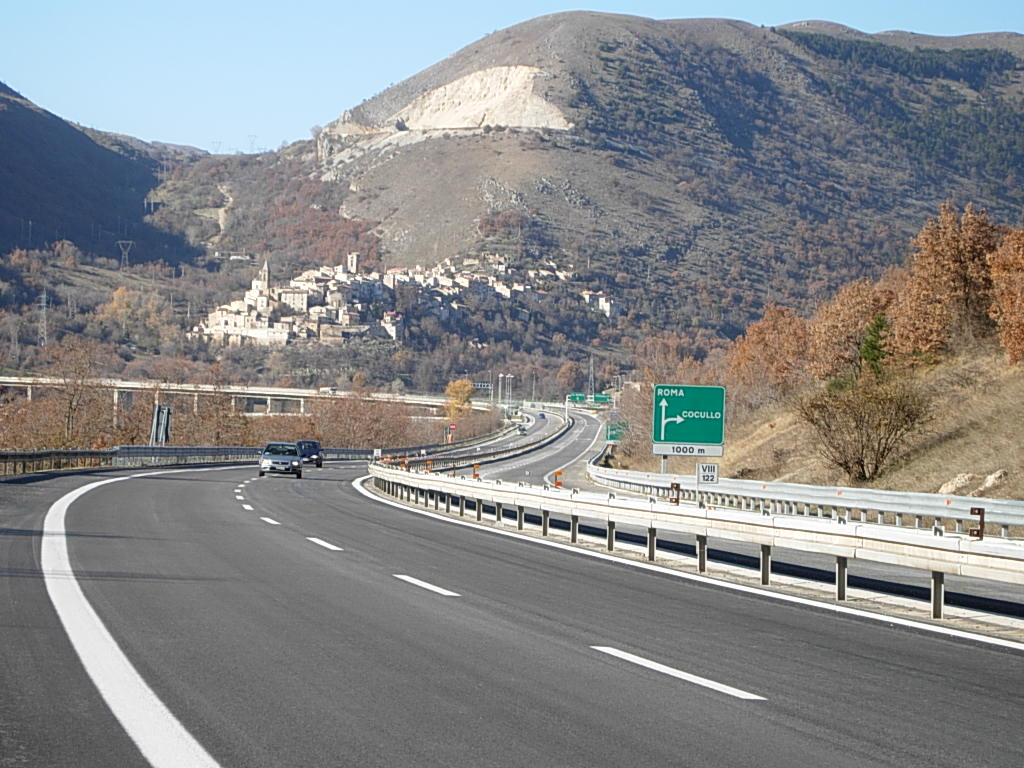 Autostrada A25 nei pressi di Cocullo (AQ) Foto personale comcessa in PD